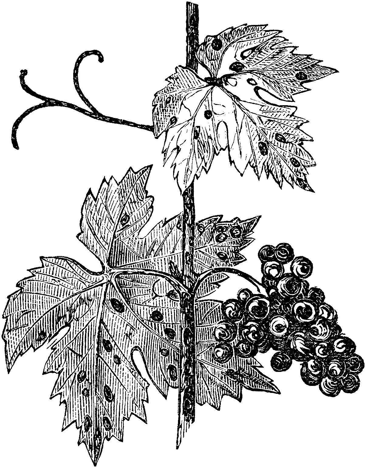 Slika 343. Trtni pikec. (Gloeospórium ampelophágum.) [sic!]